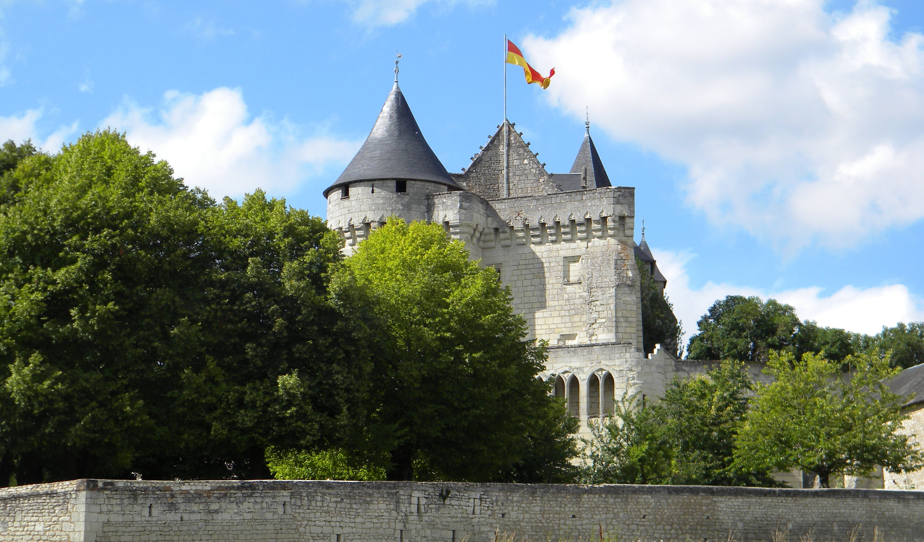 Le château de la Motte à Usseau